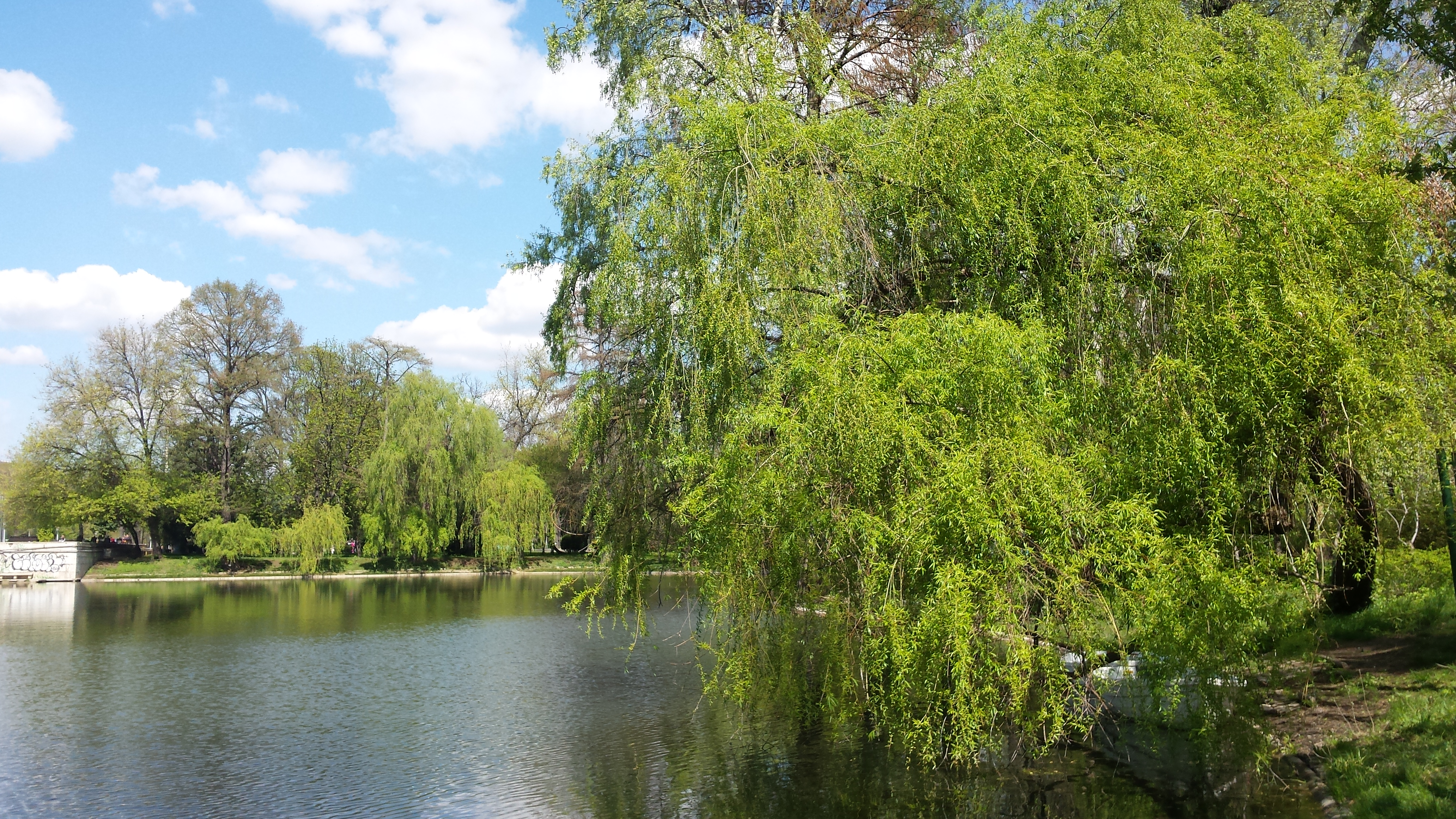 Parcul Carol, aprilie 2017.